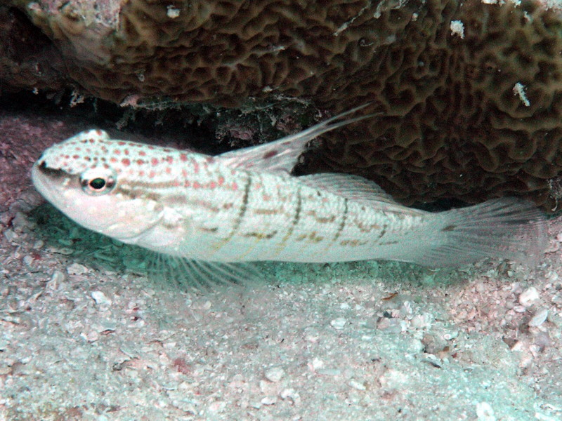 Grundel, Amblyogobius semicinctus Malediven, Veligandu, Dezember 2004, Urheber: Matthias Kleine (selbst fotographiert) Kamera: Olympus C-765